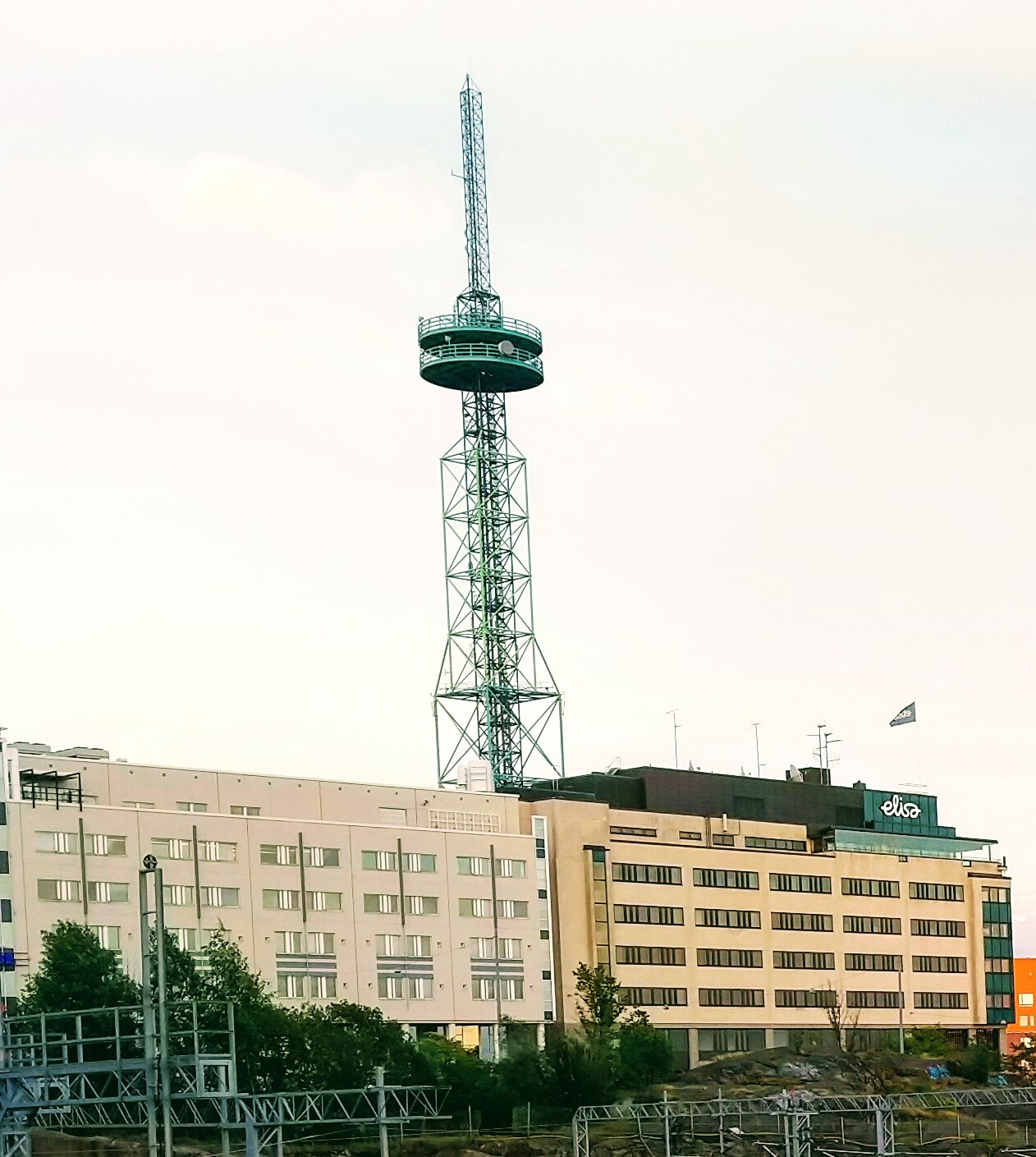 Elisan linkkitorni ja pääkonttori